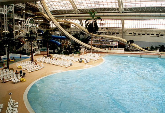 Freizeitbad in der West Edmonton Mall Die Qualität ist nicht so toll. Wenn jemand ein besseres Bild hat, dann kann das Bild hier gern ausgetauscht werden. Ich wollte erstmal überhaupt einen Blick hinein erlauben, ohne die Webseite der Mall besuchen zu müssen.